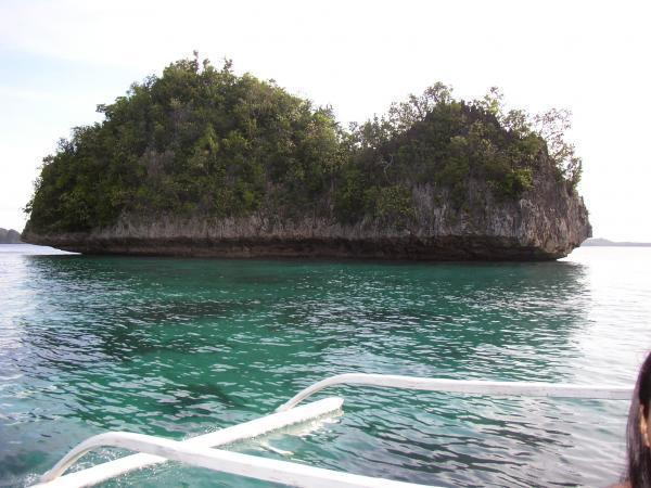 Magsaysay